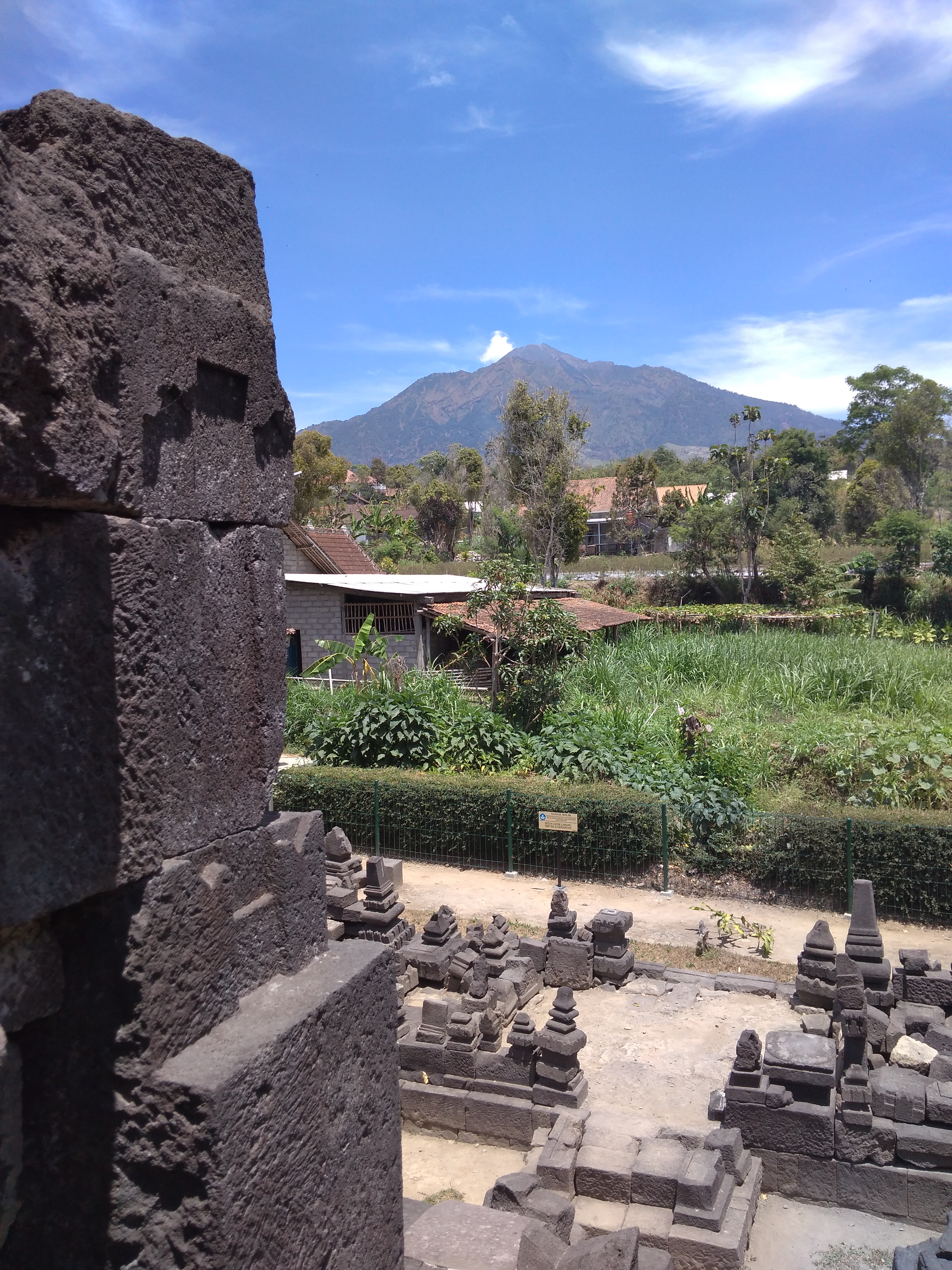 Pemandangan Gunung Merapi dari Candi Lawang